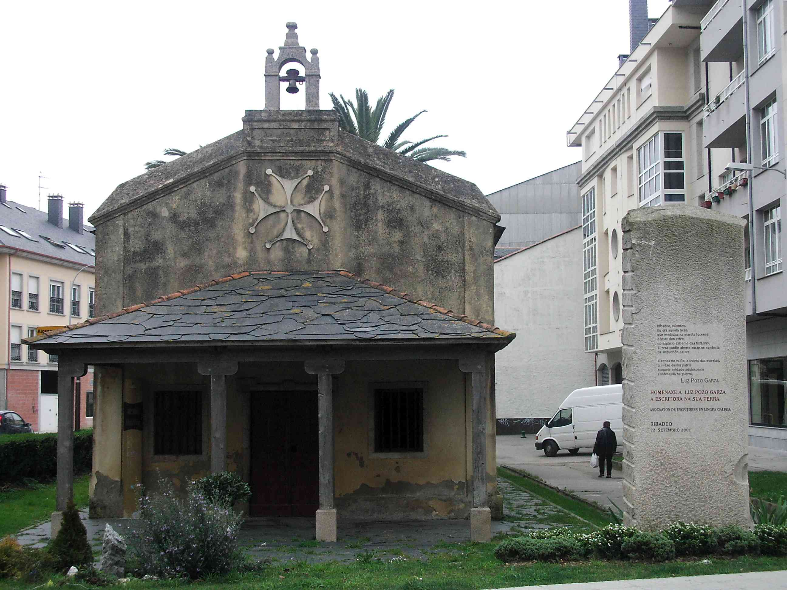 Monólito homenaxe a Luz Pozo Garza en Ribadeo, xunto á capela da Virxe do Camiño.